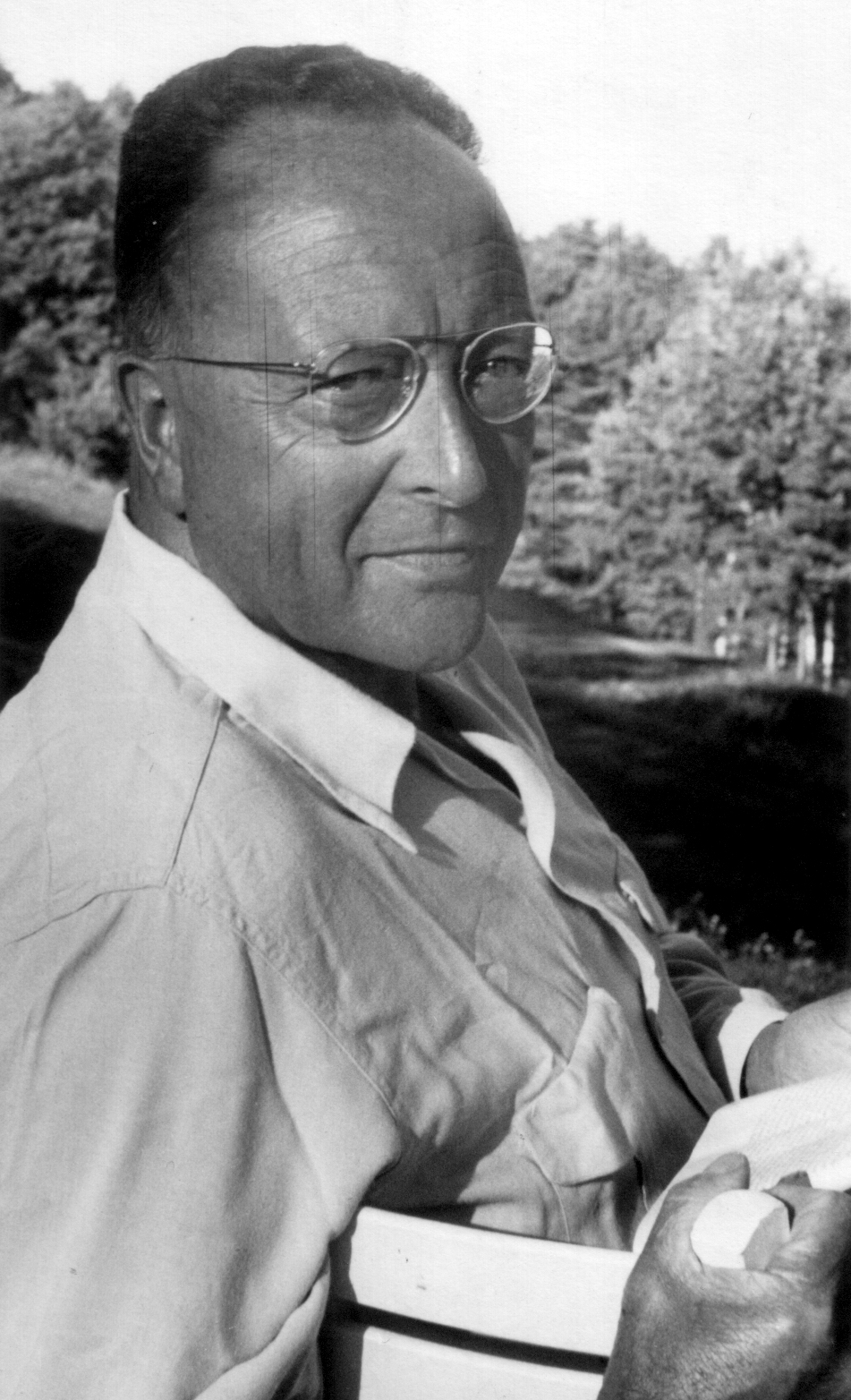 Hans SIMONS, Sept. 1952